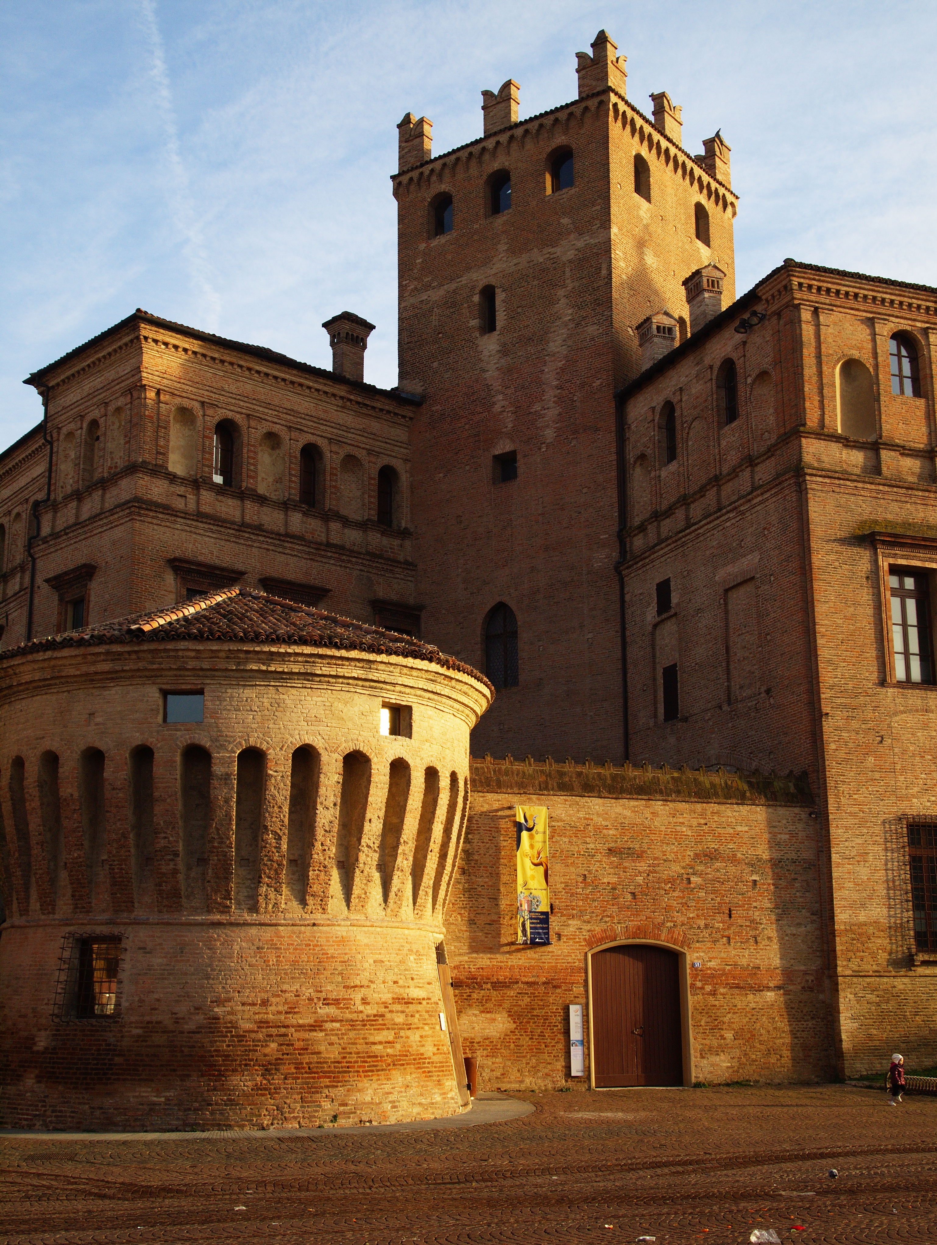 Palazzo dei Pio, detto Castello - Carpi- Modena- Italia